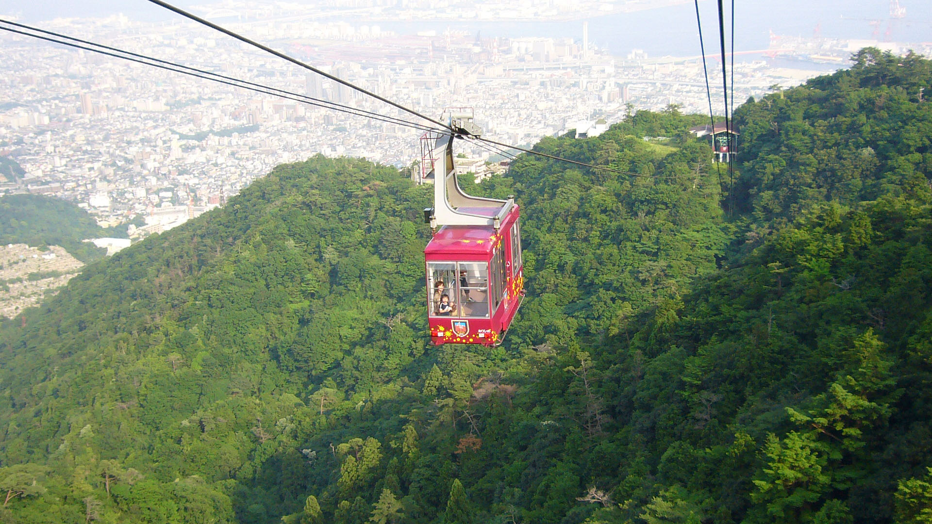 Maya Ropeway in Kobe, Japan